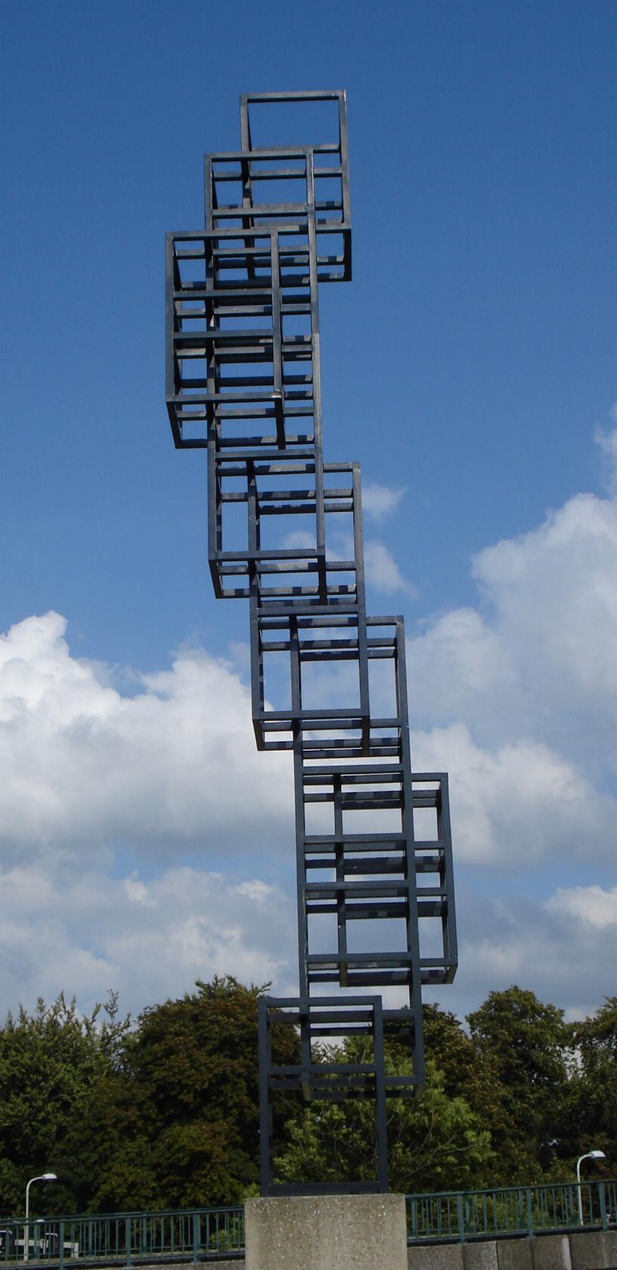 Den Haag, Plesmanweg. Kunstwerk "Synthetische constructie F8-1B" (1978) van Joost Baljeu. The Hague/The Netherlands.